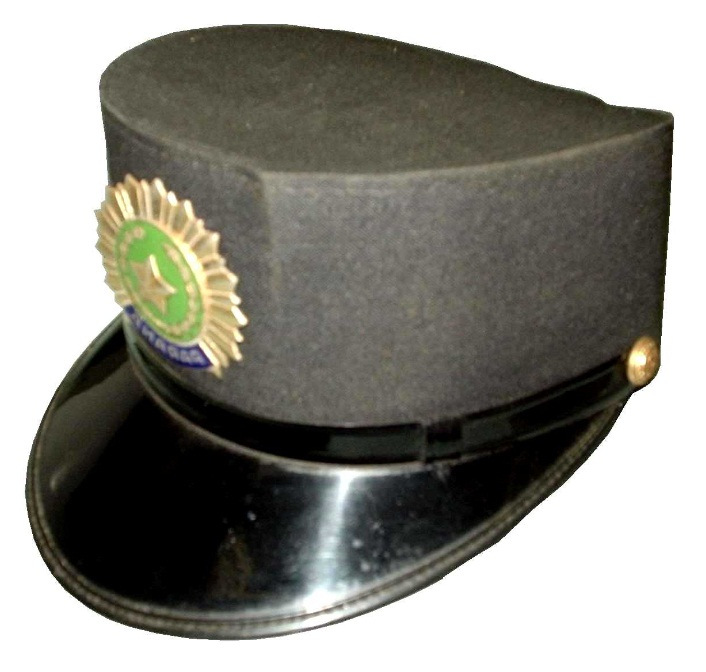 Casquete feminino da Polícia Militar do Paraná em 1977.